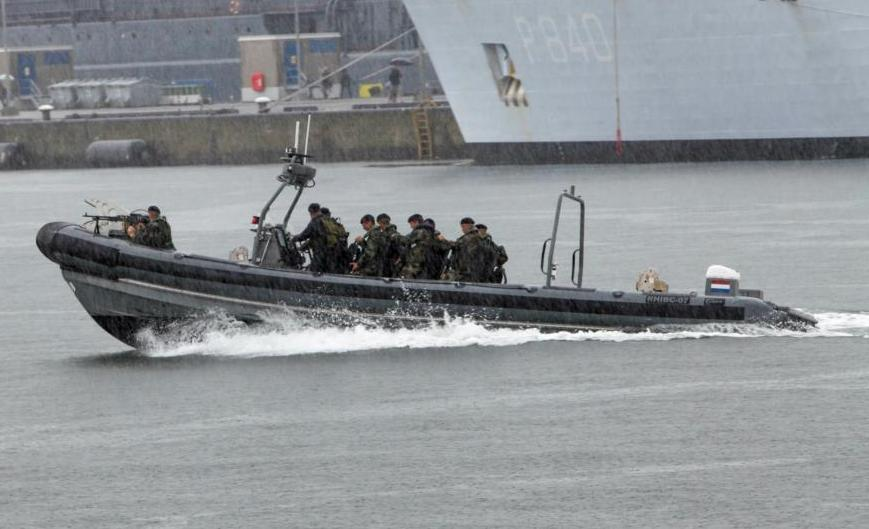 De FRISC onderweg een piratenbootje te onderscheppen op de marinedagen 2012